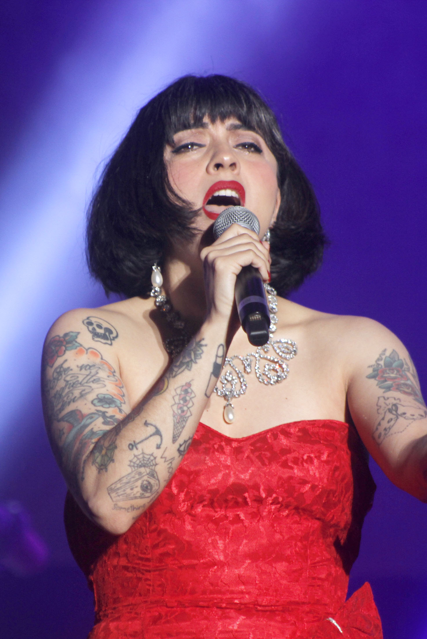 Viernes 25 de octubre de 2019En el Zócalo capitalino se realizó el Homenaje al “Príncipe de la Canción” José José con un elenco encabezado por sus hijos José Joel y Marisol Sosa, acompañados de artistas como Manuel Mijares, Napoleón, Dulce, Yuri, Pandora, Mon Laferte, María León, Natalia Jiménez, Paty Cantú, Reyli, Erik Rubín, Kalimba, Leonel García y las bandas DLD, Moenia, Río Roma y La Sonora Santanera. Fotografía: Maritza Ríos / Secretaría de Cultura de la Ciudad de México